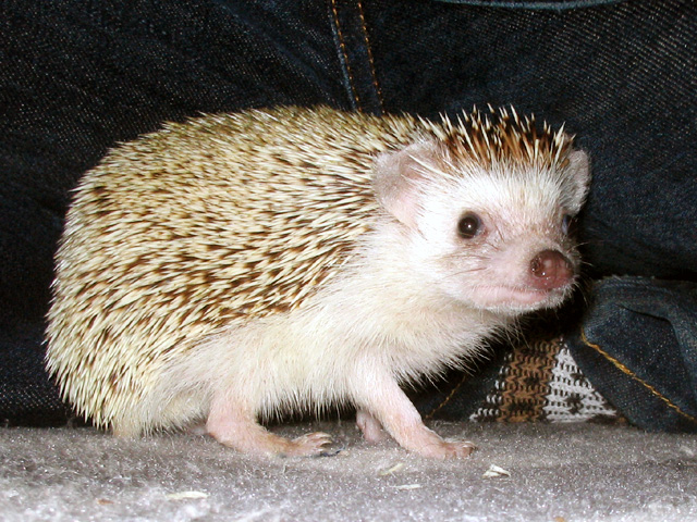 A pet hedgehog